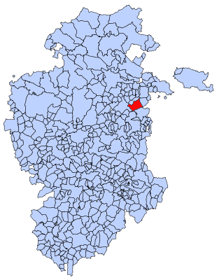 Quintanilla San García en Burgos